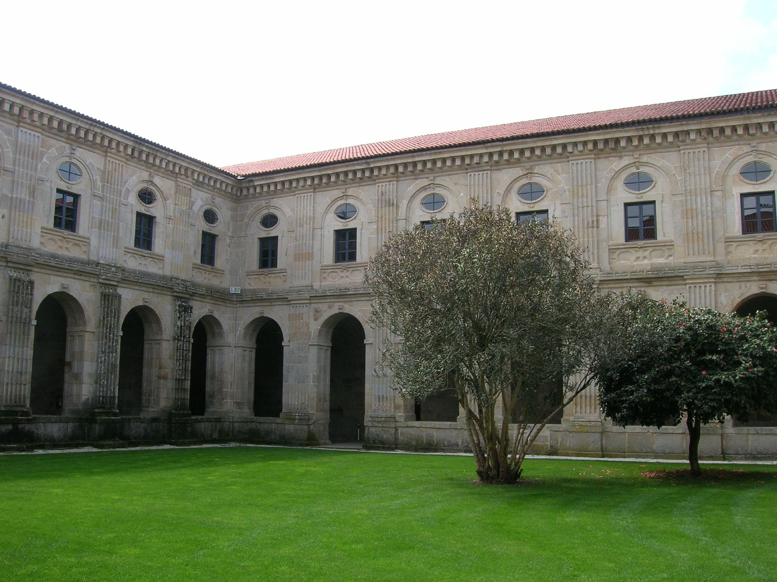 Mosteiro de San Clodio de Leiro, Leiro, Galicia - Spain